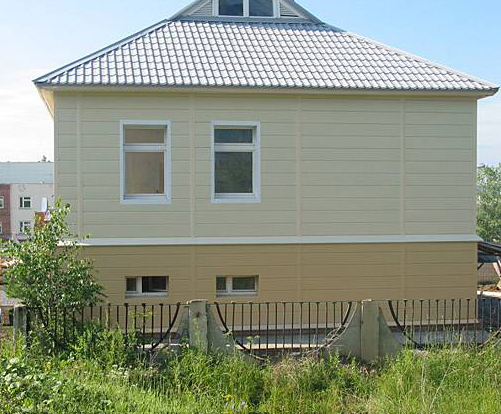 линеарные панели и металлочерепица Металл Профиль